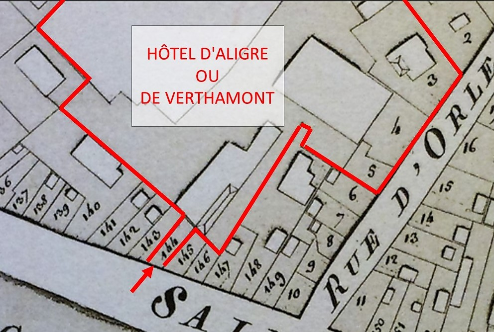 Plan commenté de la parcelle n°146 Hôtel d'Aligre et de Verthamont extrait de l'Atlas des Censives de 1720.